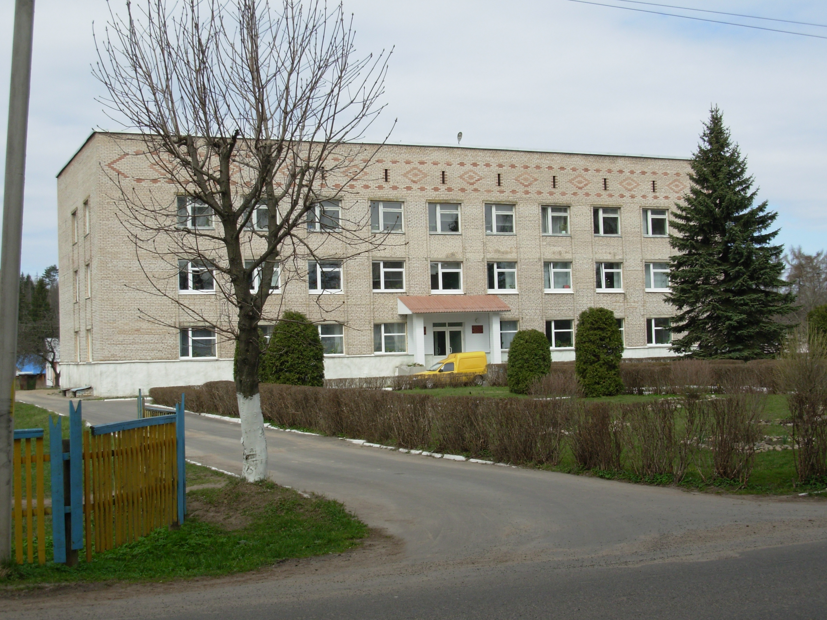 Беларуская (тарашкевіца): Інстытут ільна Акадэміі навук Беларусі